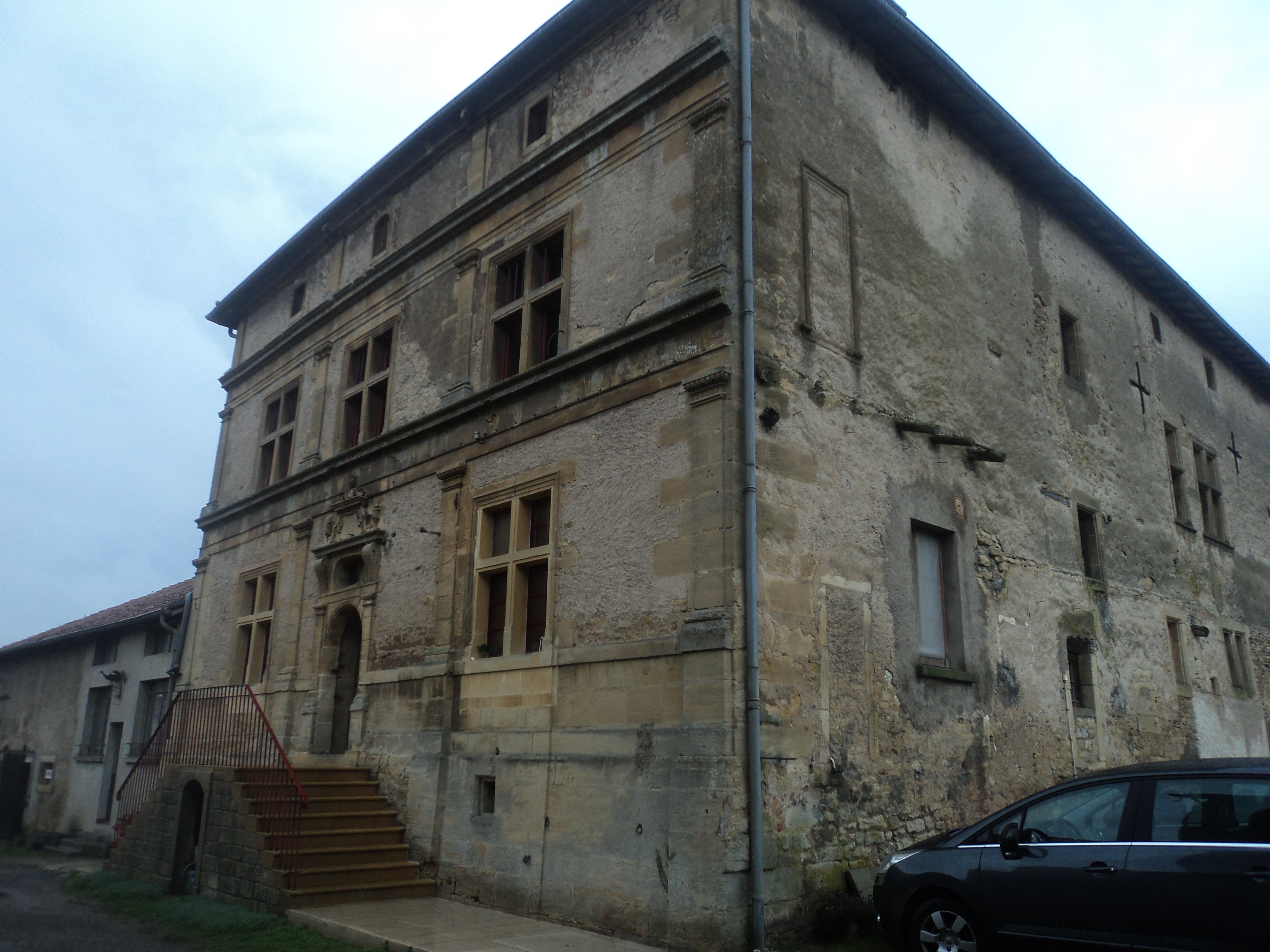 Vue de la façade avant et de côté de la ferme auberge Sainte-Mathilde à Tucquegnieux .